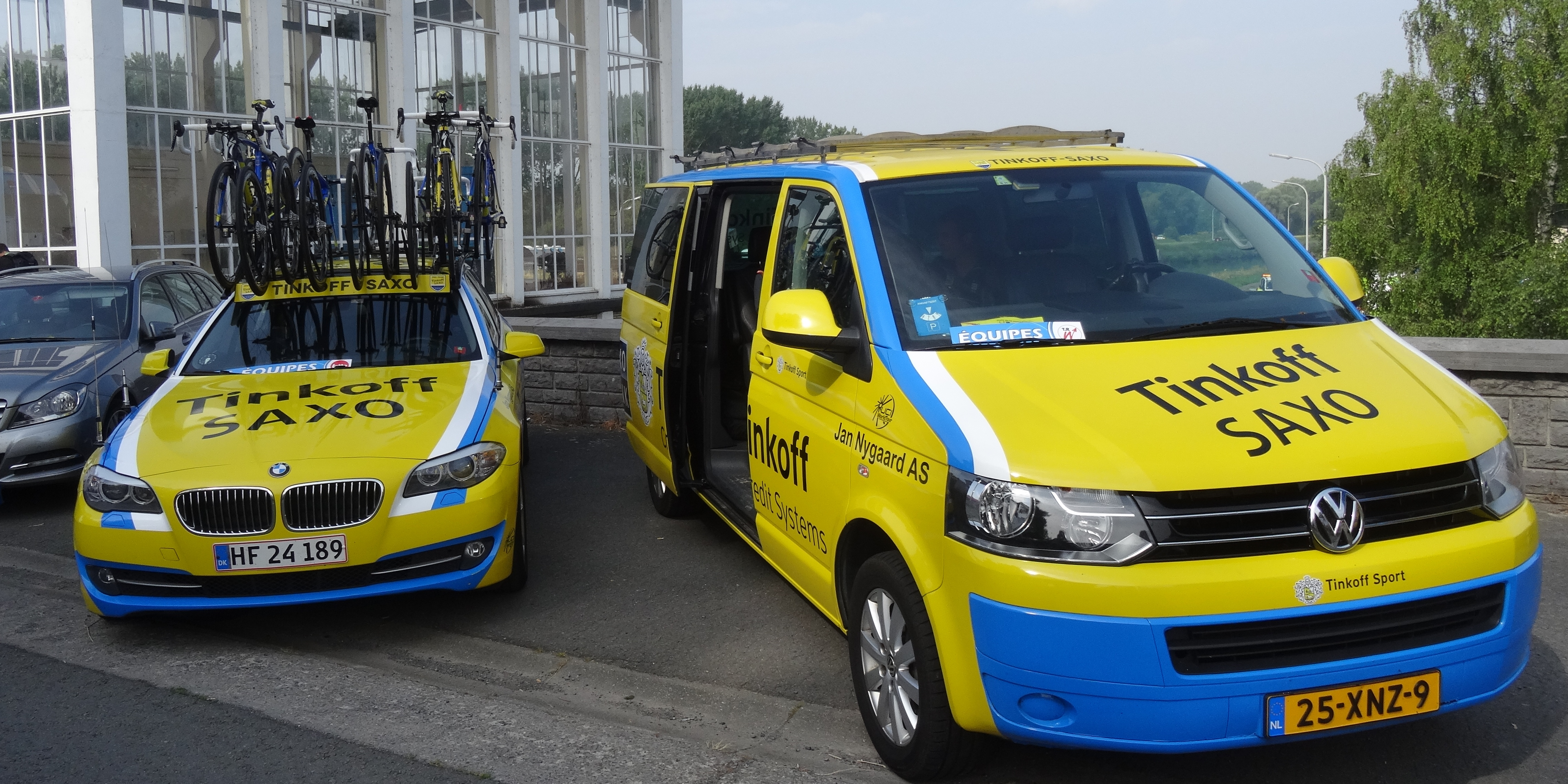 Reportage photographique réalisé le dimanche 27 juillet à l'occasion du départ de la deuxième étape du Tour de Wallonie 2014 à Péronnes-lez-Antoing (Antoing), Belgique.